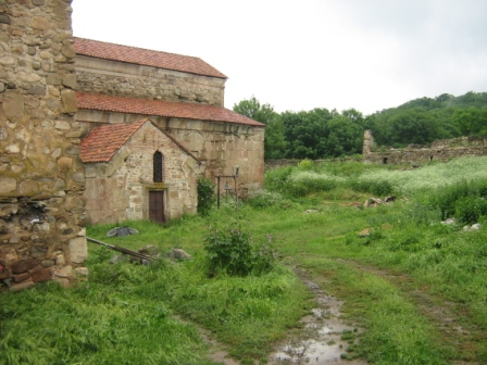 ხაშმის სამების ეკლესია